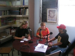 Foto zelf gemaakt